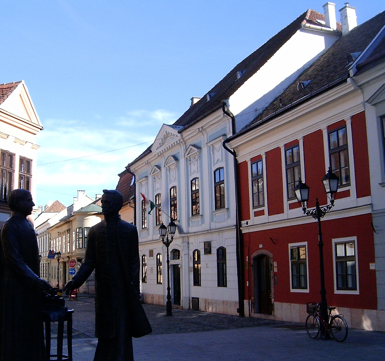 A nemesi konviktus épülete Győrött (Győr-Moson-Sopron megye)